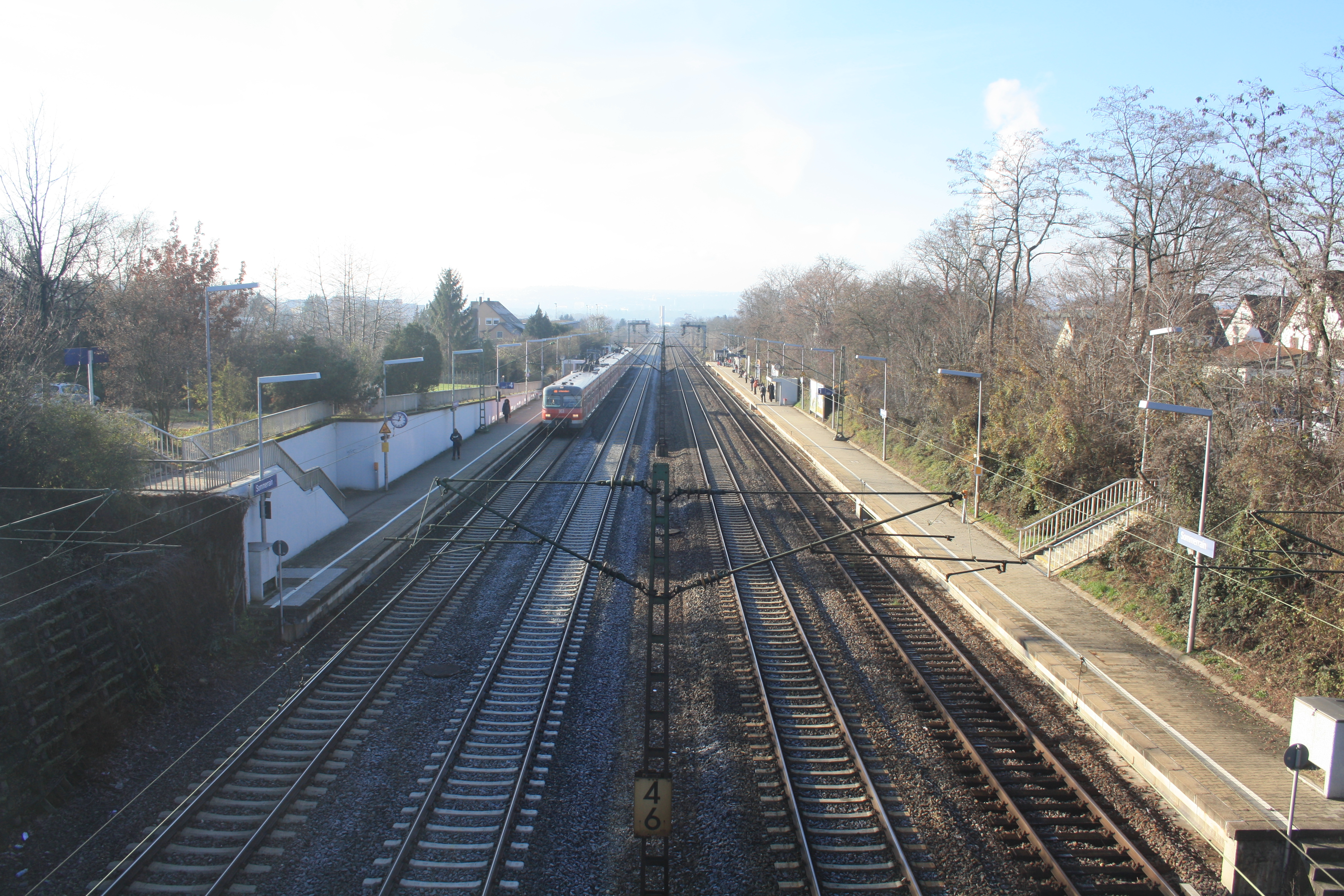 S-Bahn Haltepunkt Stuttgart-Sommerrain im Dezember 2012 von der Fußgängerbrücke östlich des Haltepunktes in Richtung Bad Cannstatt gesehen. Auf Gleis 4 hält ein ET 420 der Linie S2 der S-Bahn Stuttgart auf seiner Fahrt von Filderstadt nach Schorndorf. Im Regelfall wird Gleis 1 (rechts) von stadteinwärtigen den S-Bahnen in Richtung Stuttgart befahren, auf den Gleisen 2 und 3 in der Mitte verkehren die Regional- und Fernzüge nach Stuttgart und in Richtung Aalen, Schwäbisch Hall-Hessental sowie Nürnberg und auf Gleis 4 halten die stadtauswärtigen S-Bahnen nach Backnang bzw. Schorndorf über Waiblingen.